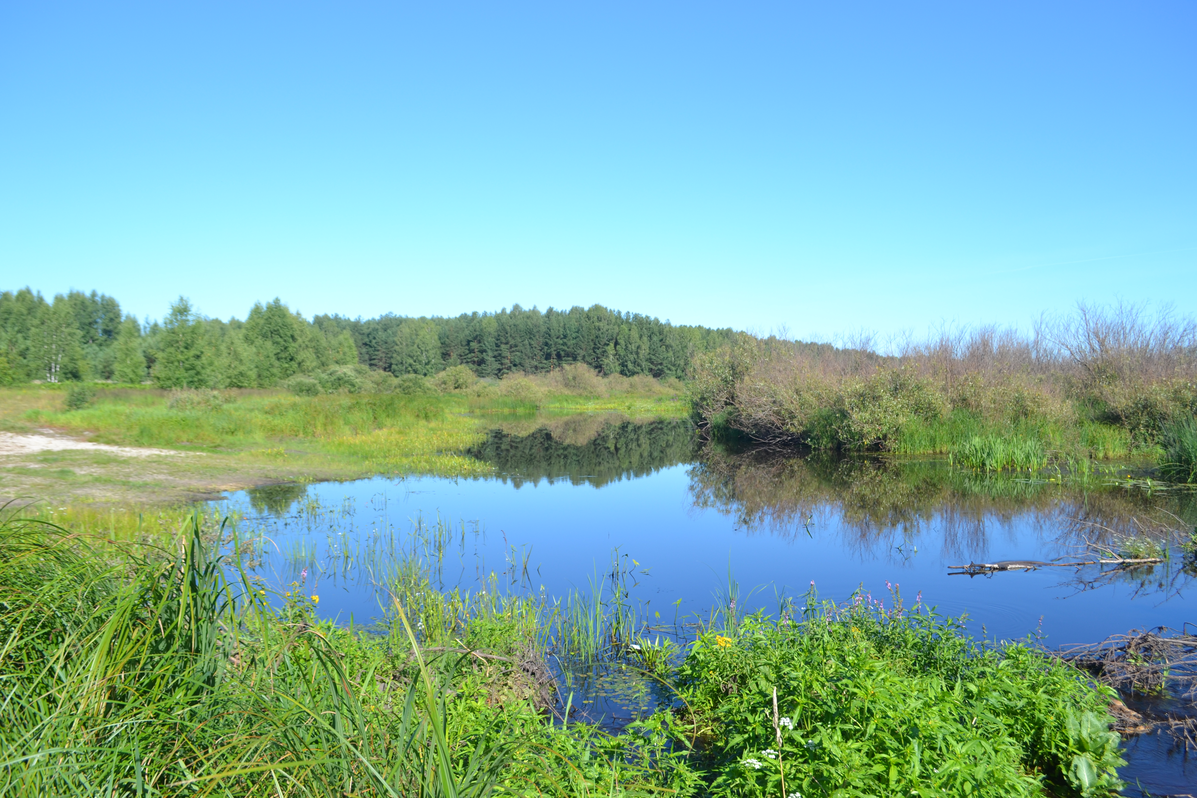 Река Ялма в окрестностях Великодворья (Шатурский район)